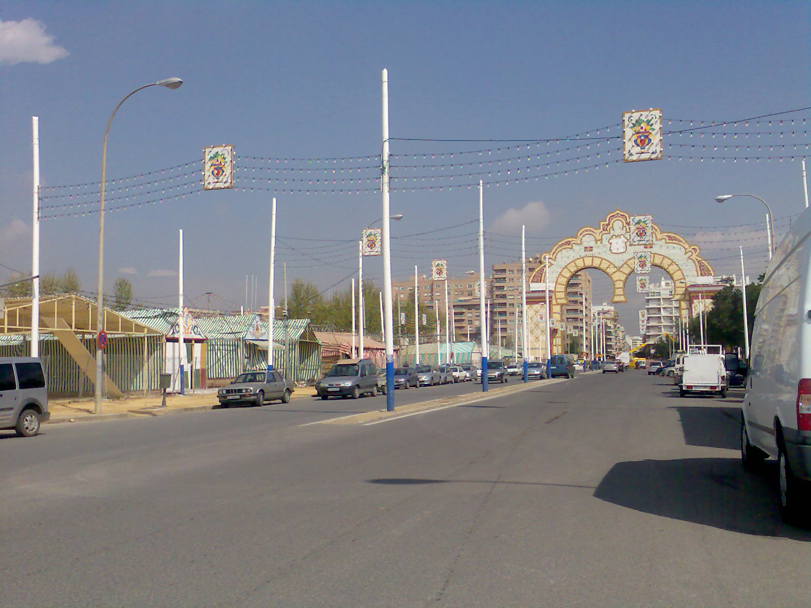 Portada de la Feria de Abril de Sevilla 2007. Imagen tomada con un teléfono Nokia 6234